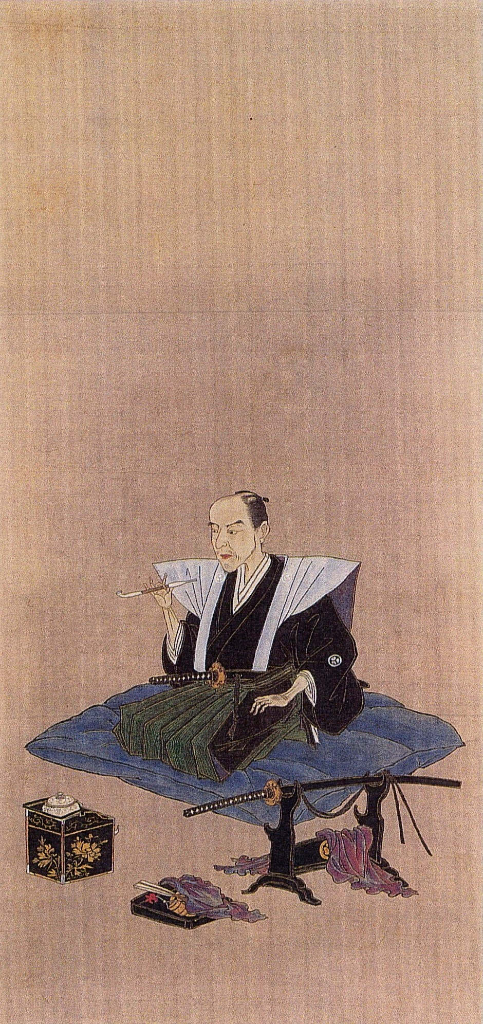 讃岐高松藩8代藩主・松平頼儀の肖像画。